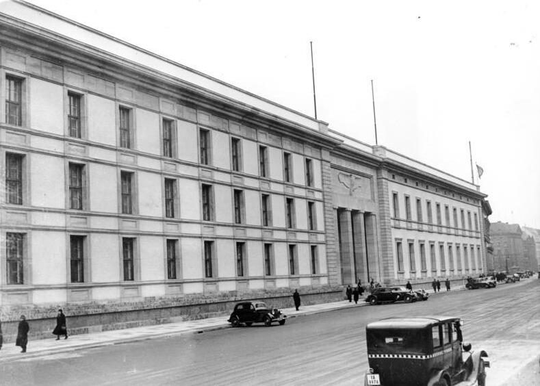 Reichsbahnzentrale für den Deutschen Reiseverkehr; Berlin. Die Neue Reichskanzlei in der Voßstraße. Weltbil GmbH, Erwerb des Fotos: 9.1.1939